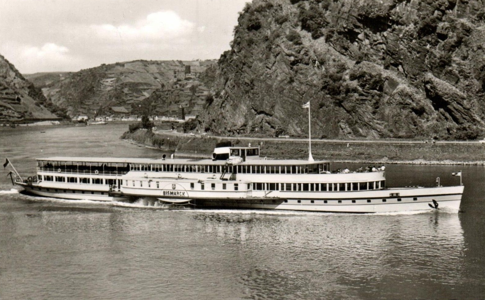 Der Raddampfer Bismarck an der Loreley (1960)